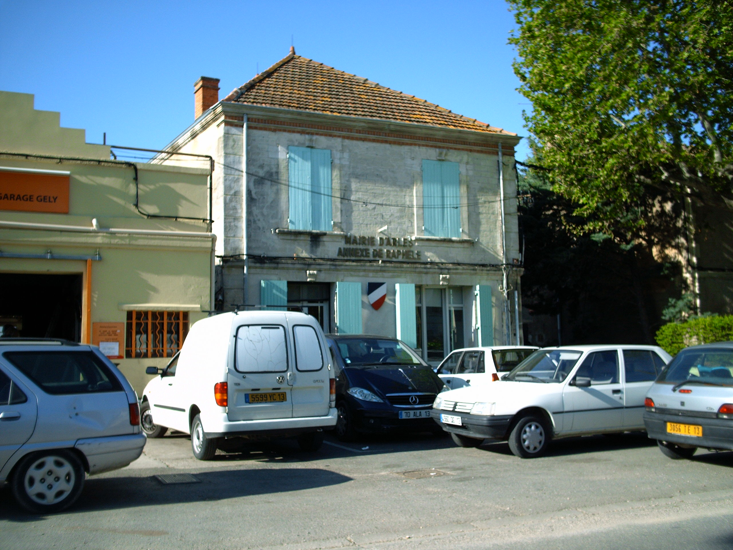 Mairie annexe de Raphèle les Arles (Bouches-du-Rhône)